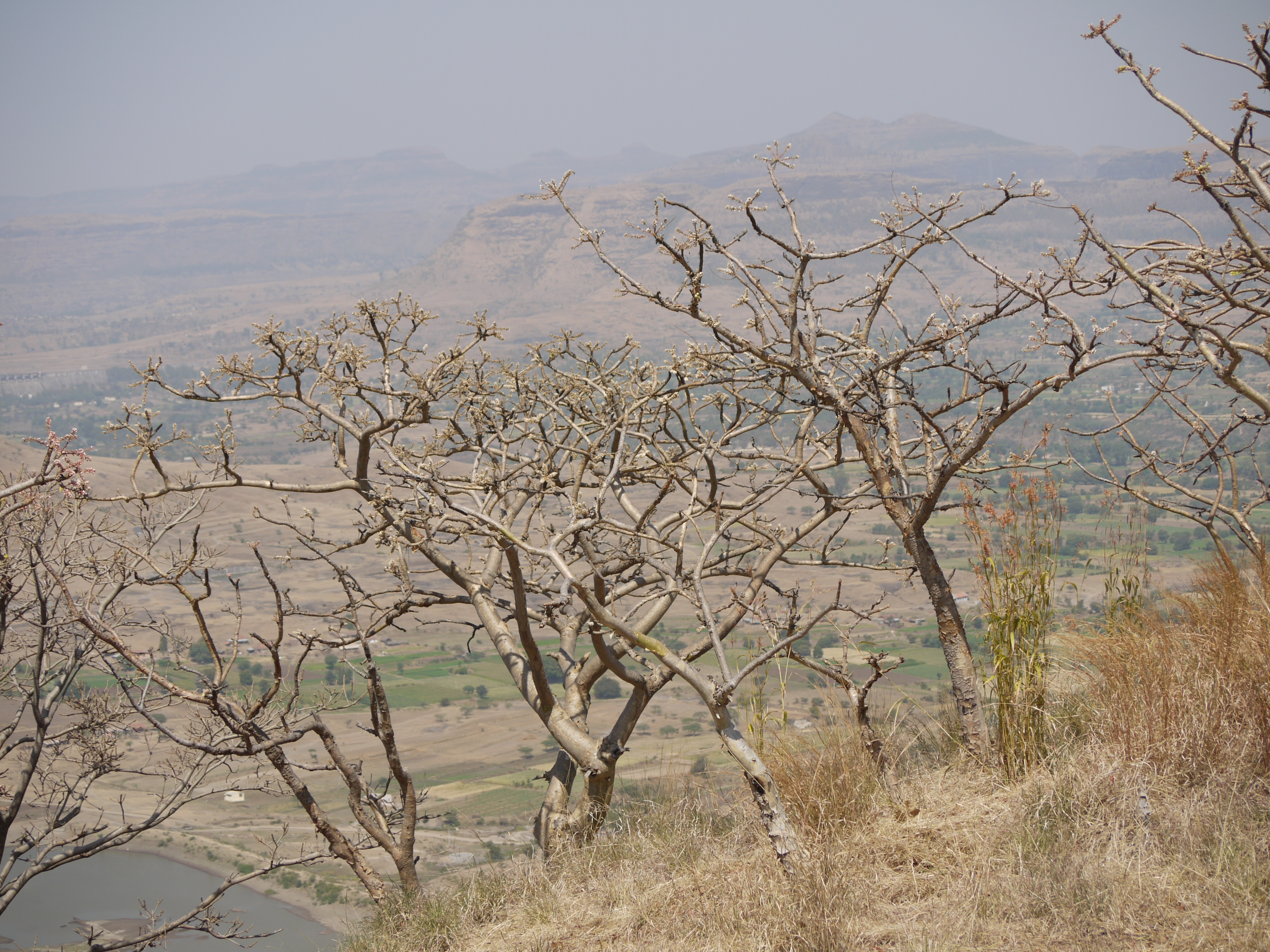 Burseraceae (incense or torchwood family) » Boswellia serrata bos-WELL-ee-a -- named for John Boswell, Scottish botanist and FRCP of Edinburgh sair-AY-tuh or ser-RAT-uh -- toothed like a saw commonly known as: Indian frankincense tree, Indian olibanum tree, salai tree • Gujarati: સાલેડી saaledi, સલાઈ ગૂગળ salaai gugul • Hindi: शल्लकी shallaki • Kannada: ಗುಗ್ಗುಳ ಮರ guggula mara • Malayalam: കുങ്ങില്യം kungilyam • Marathi: धुपाळी dhupali, धूपसाळी dhupasali, कुरुंद kurunda, सालफळी salaphali, साळई salai, साळी sali • Oriya: salai • Pali: सल्लकी sallaki • Punjabi: ਸਾਲ੍ਹੇ salhe, ਸਾਲਹੀ salhi • Sanskrit: भीषण bhishan, गुग्गुल guggula, हस्तिनशना hastinashana, पालंक palank, पार्वती parvati, ऱ्हादिनी hradini, कुरुन्द kurunda, सल्लकी sallaki, शल्लकी shallaki, स्रुवा sruva • Tamil: குமஞ்சம் kumancam, குங்கிலியம் kunkiliyam, மரத்துவெள்ளை marattu-vellai, பறங்கிச்சாம்பிராணி paranki-c-campi-rani, வெள்ளிக்கீரை vellai-k-kirai • Telugu: గుగ్గిలము guggilamu, పరంగిసాంబ్రాణిచెట్టు parangi-sambrani-chettu, సల్లకి sallaki ... the resin obtained from this tree is commonly known as: Indian olibanum, Indian frankincense, Konkani resin • Arabic: لبان luban • Hindi: कुंदर kundar, लोबान loban, मकन्द makand, मकुन्द makund • Kannada: ಚಿಲಕದೂಪ chilakadupa, ಧೂಪ dhupa, ಗುಗ್ಗುಳ guggula, ಹಾಲು ಮಡ್ಡಿ haalu maddi, ಲೋಬಾನ lobaana, ಪರಮ್ಗಿ ಸಾಮ್ಬ್ರಾಣಿ paramgi saambraani • Konkani: लोभान lobhan • Marathi: लोभान lobhan • Persian: گنده فيروزه gandha firoza, لوبان loban • Punjabi: ਲੋਬਾਣ loban • Sanskrit: द्विज dvija, कुन्दुर kundur, कुन्दुरु kunduru, मुकुन्दः mukundah, पालंकी palanki, पालंक्या palankya, सुरभी surabhi, तुरुष्क turushka • Telugu: కుందురువు kunduruvu • Urdu: لوبان loban Endemic to: India References: Flowers of India • NPGS / GRIN • DDSA